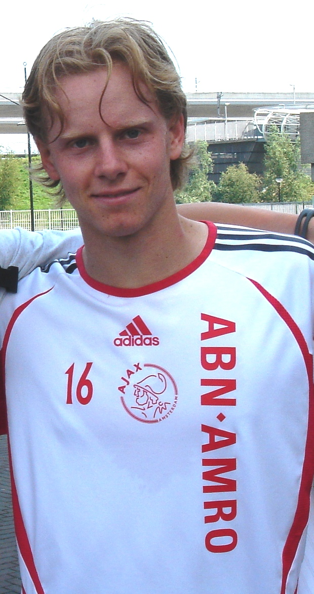 Tom de Mul, bij een training in de arena